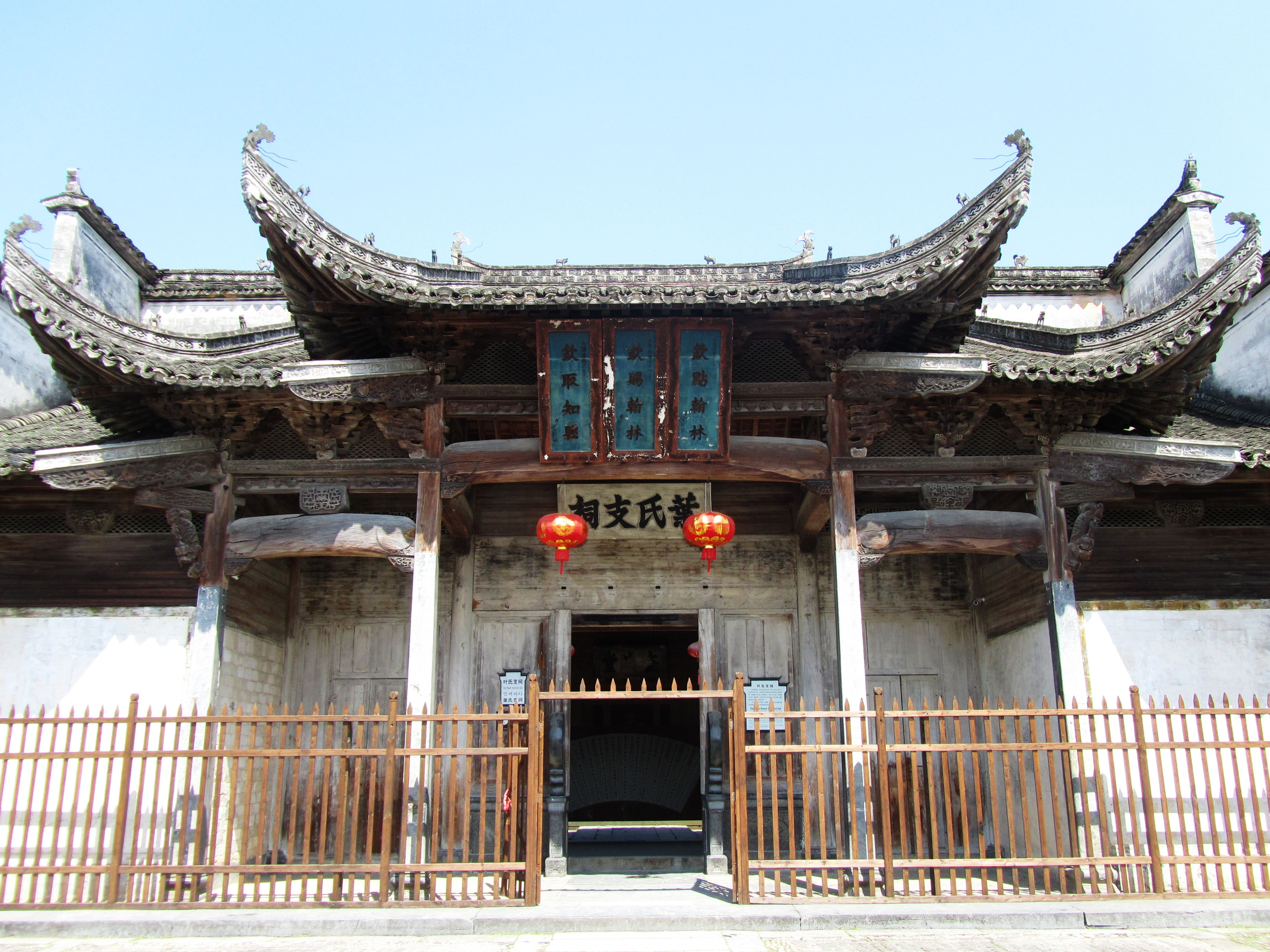 黟县南屏村叶氏支祠大门。